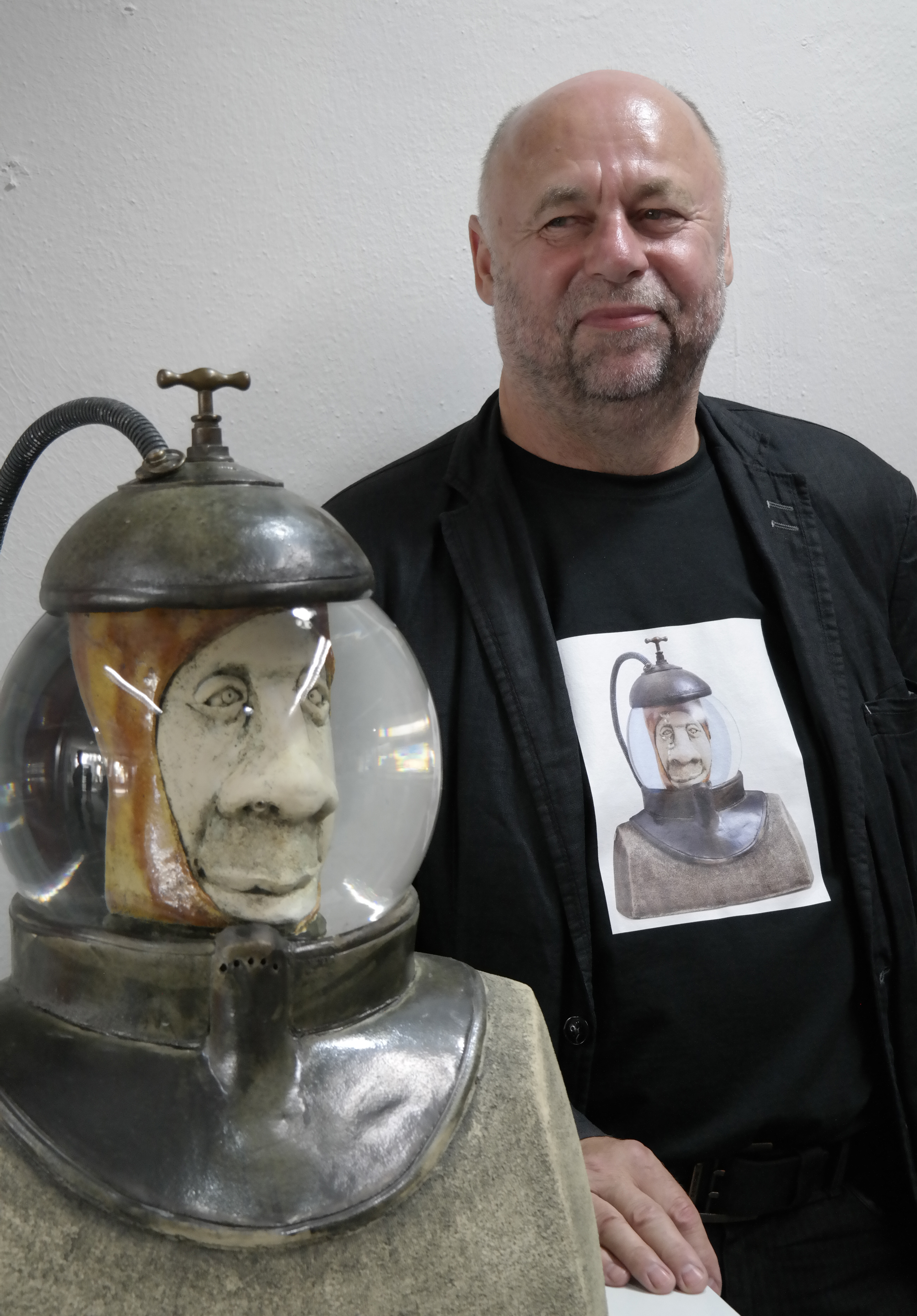 Porträt Rainer Sperl